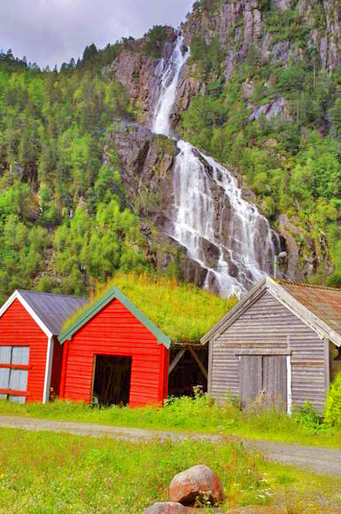 Mo, Modalen